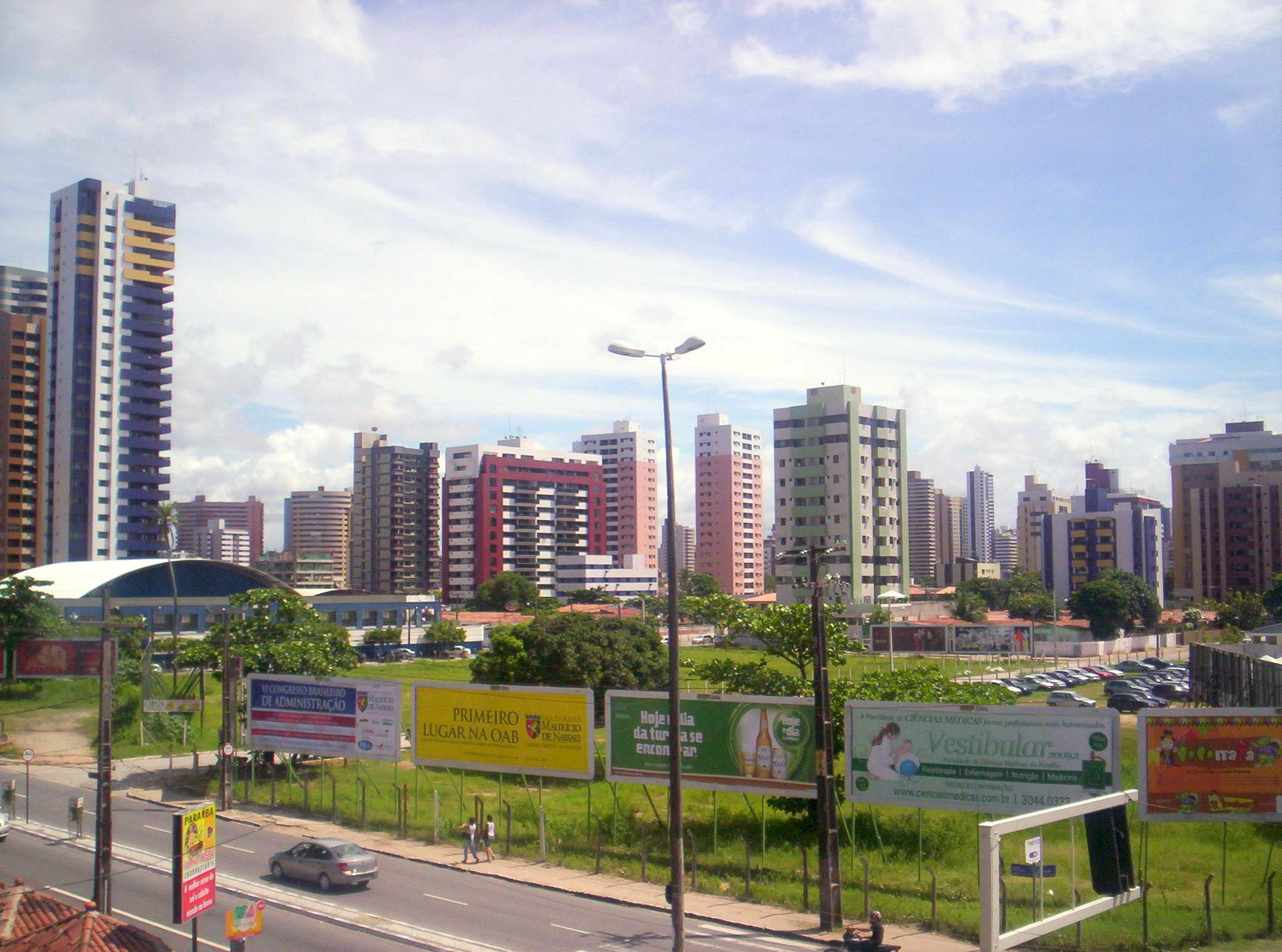 Fotos Corriqueiras